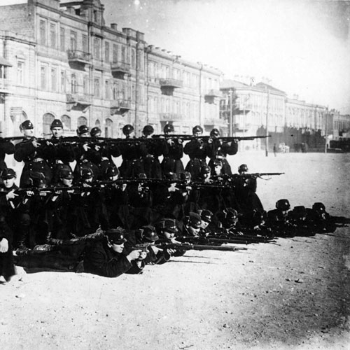 Бакинская милиция.